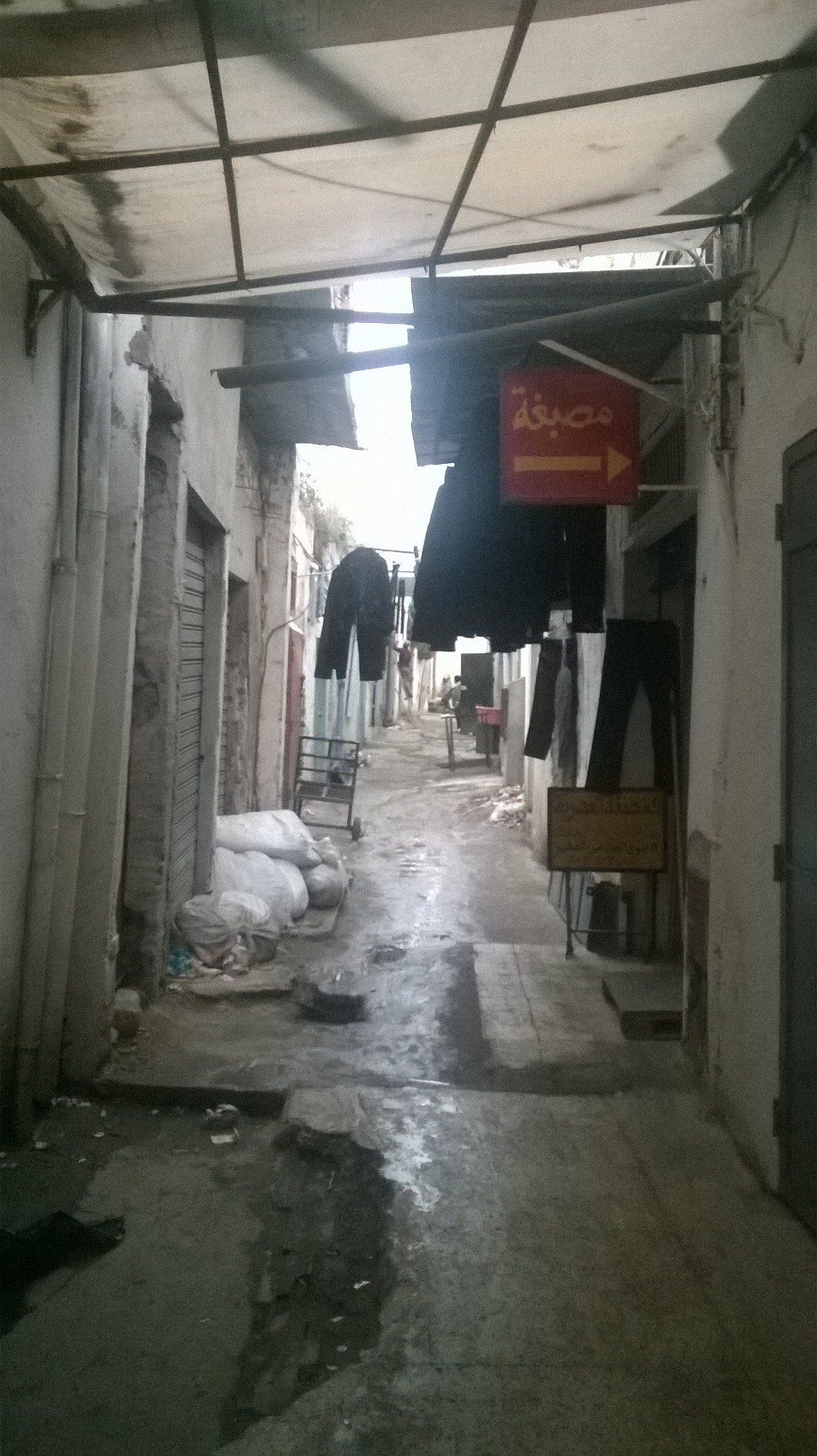 Souk des Teinturiers, medina de Tunis سوق الصباغين , مدينة تونس العتيقة